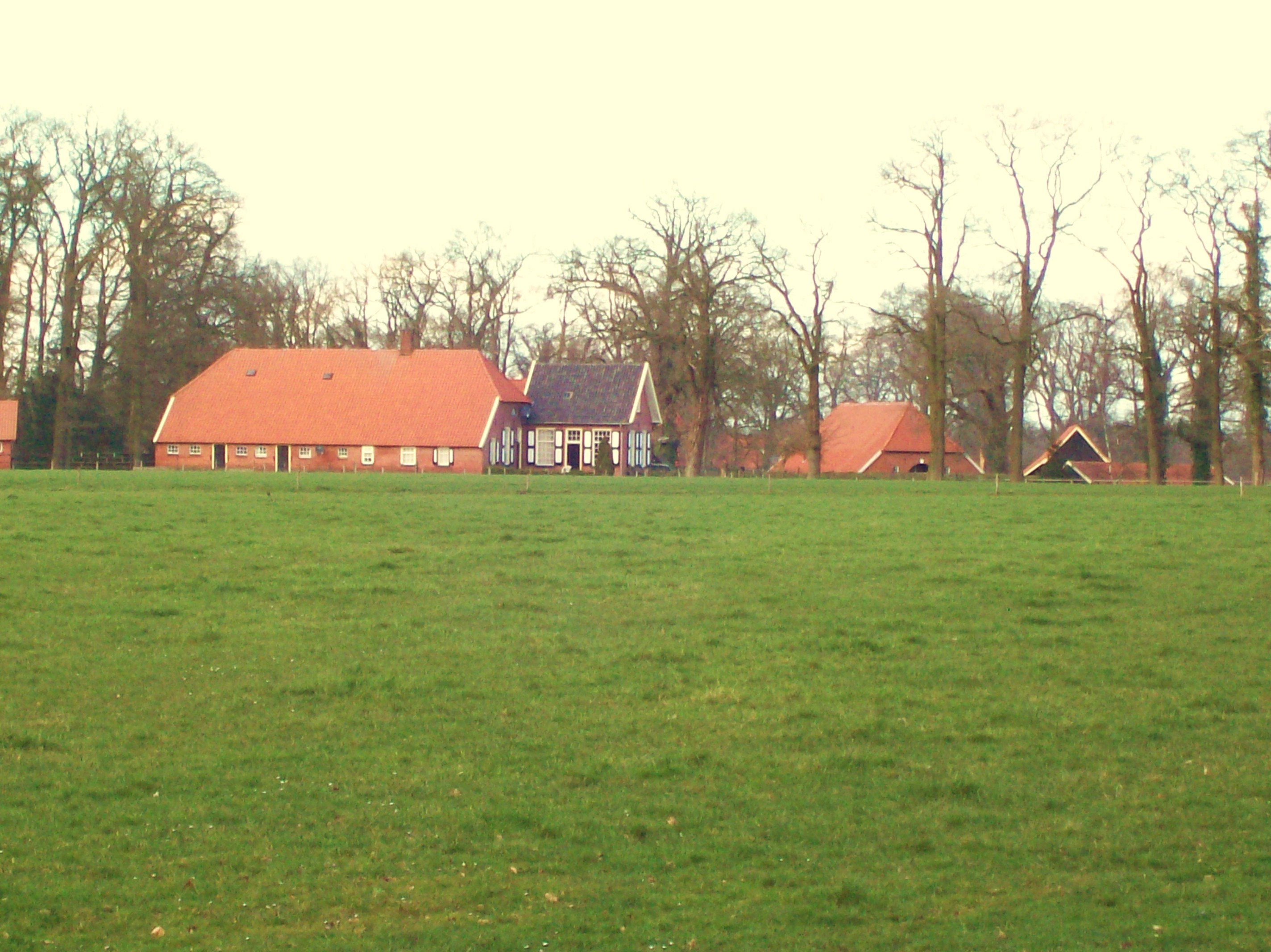 Boerderij Meijer in Azelo